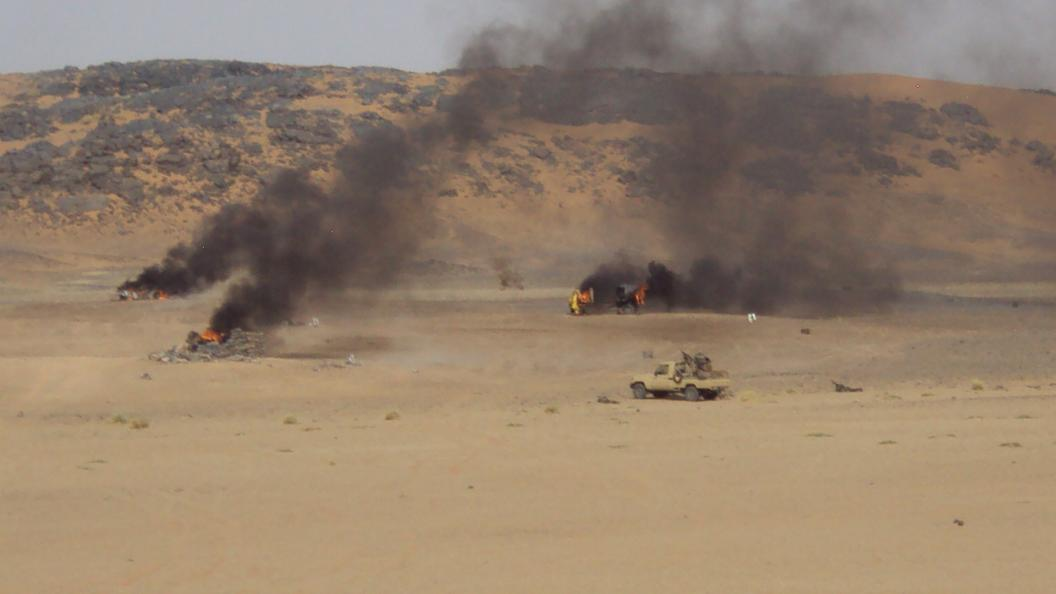 [Mohamed Wedoud] Mauritanian soldiers conduct exercises near the Mali border. مناورات للجنود الموريتانيين قرب الحدود المالية L'armée mauritanienne procède à des exercices à proximité de la frontière malienne.